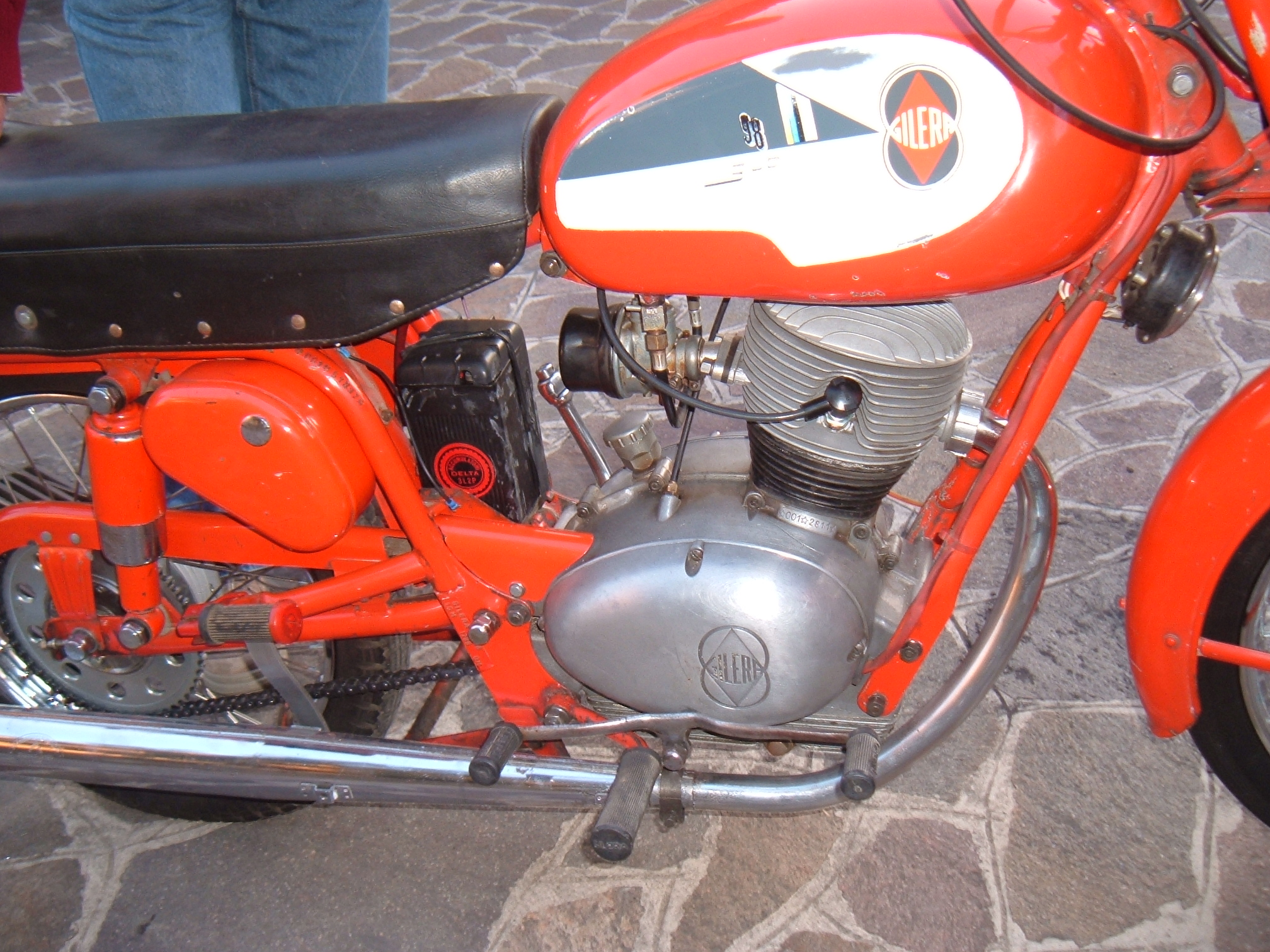 Gilera Giubileo 98 Extra del 1959